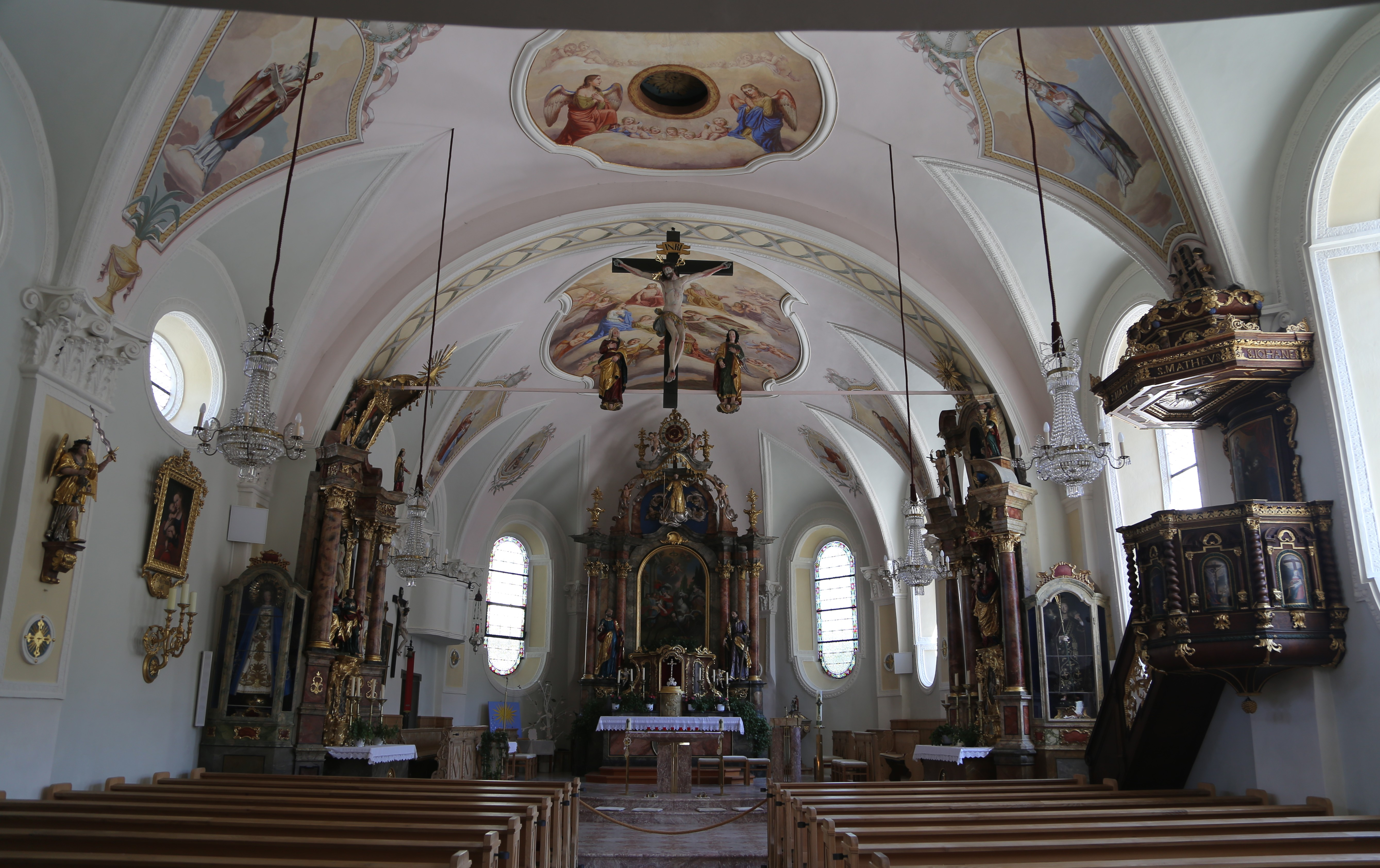 Sankt Georg, Brandenberg (Tirol)